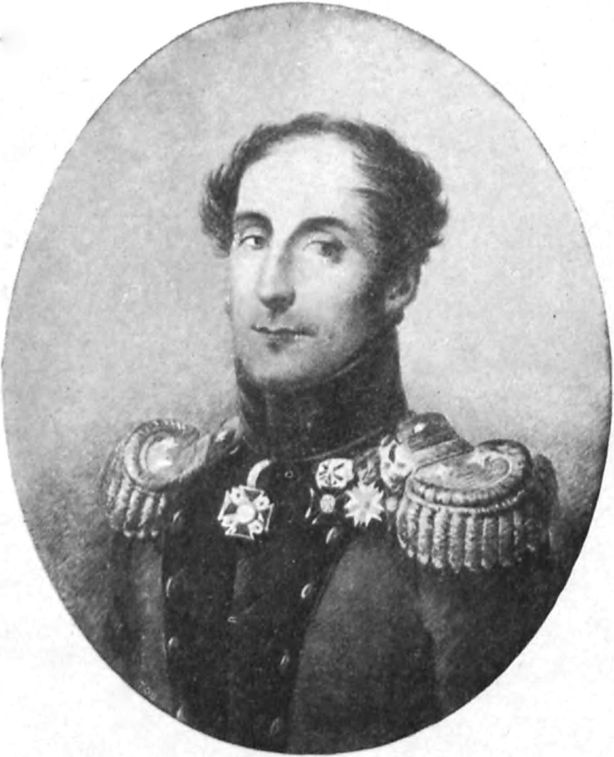 Jakub Redel (1769-1845)